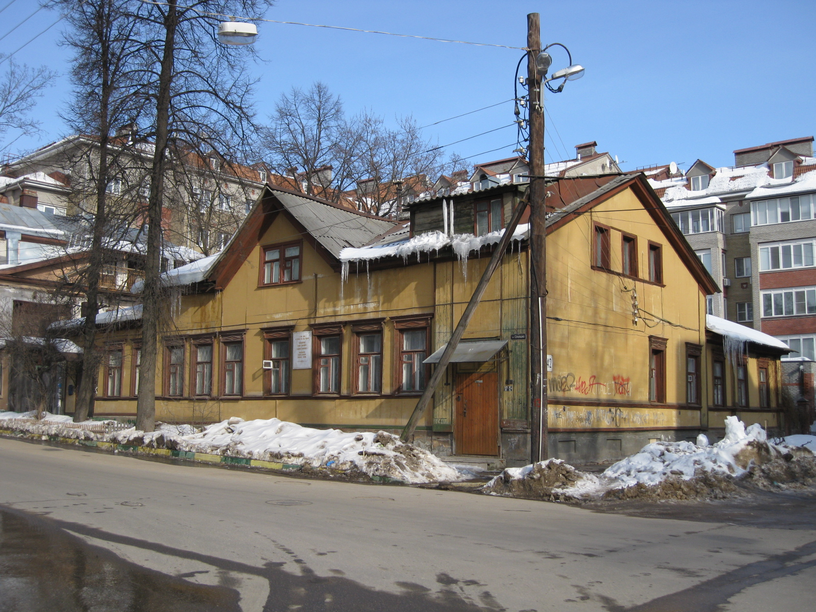 Дом, в котором в 1819 году родился писатель Мельников-Печерский П.И.: улица Ульянова, 42, Нижний Новгород, Нижегородская область